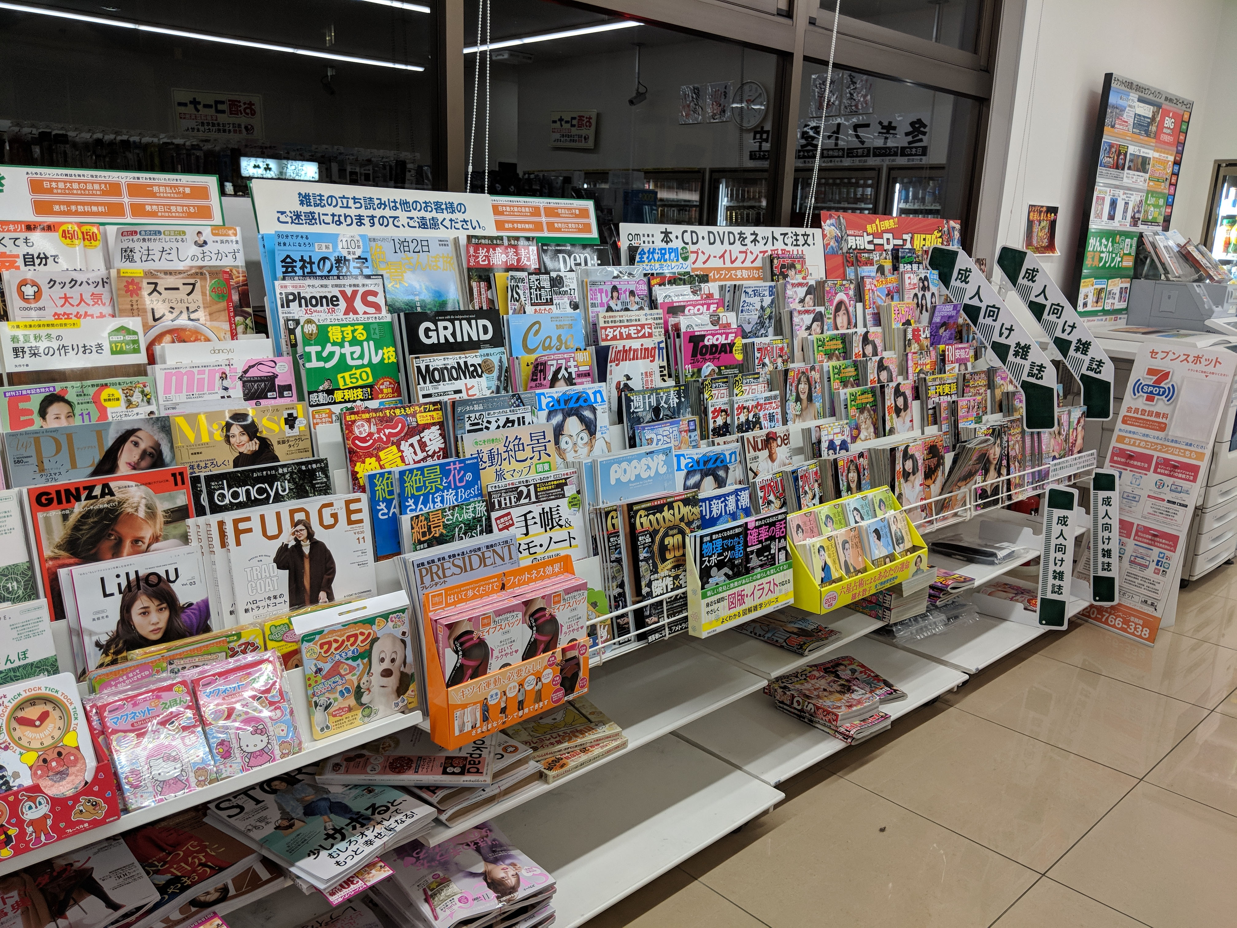 「セブンイレブン墨田本所1丁目清澄通り店」の店内。